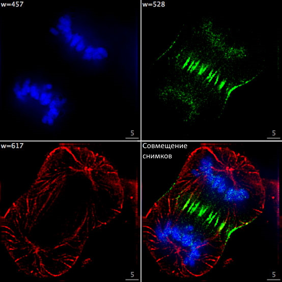 Флуоресценция делящихся клеток; На снимке изображение делящейся раковой клетки человека. Снято с помощью эпифлуоресцентного микроскопа. Клетка зафиксирована и окрашена: DAPI (окрашивает ДНК голубым), GFP-INCENP (окрашивает зеленым), тубулин (окрашивает в красный).